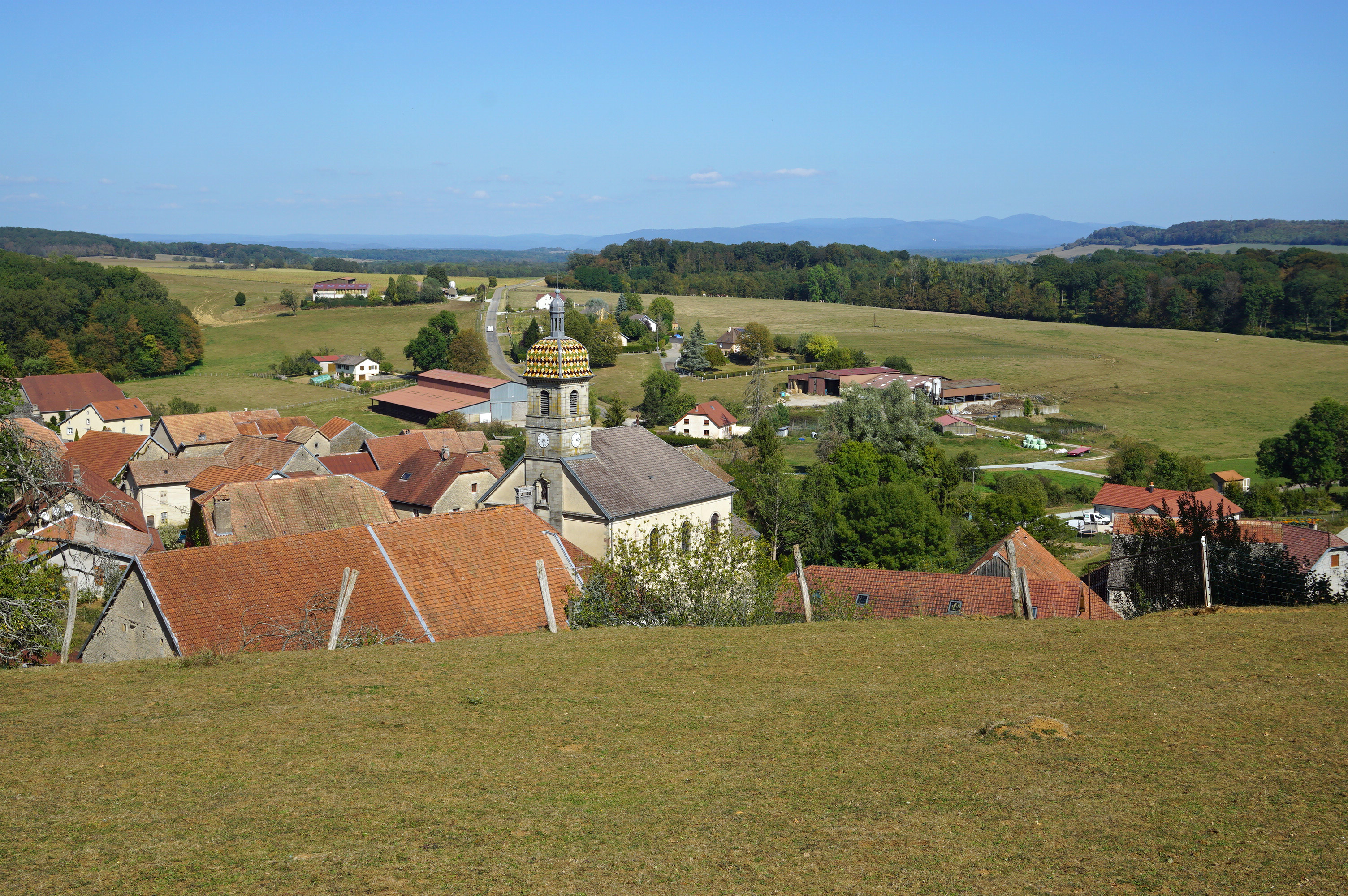 Vue du village d'Aillevans et les Vosges en arrière-plan.